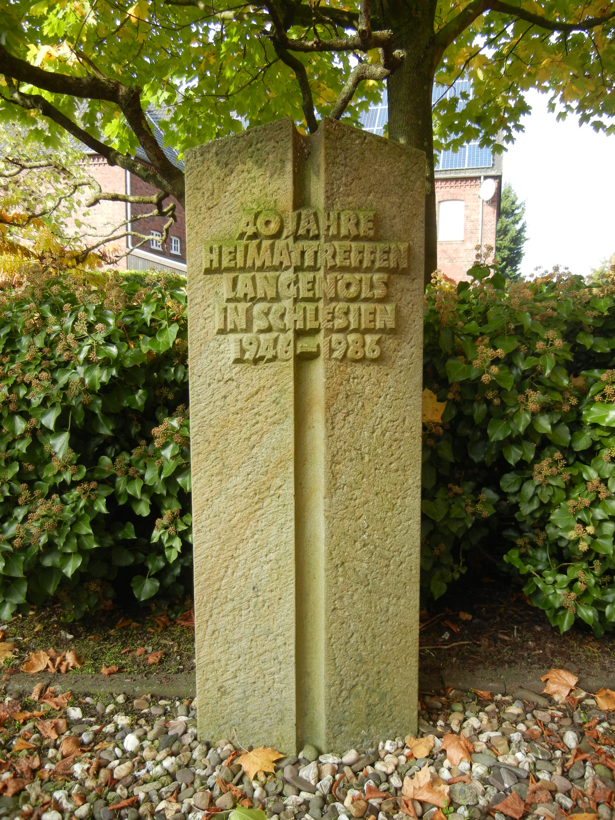 Gedenkstein am Haupteingang des Rathauses Ascheberg, Dieningstraße 7: 40 Jahre Heimattreffen Langenöls in Ascheberg (Westfalen)